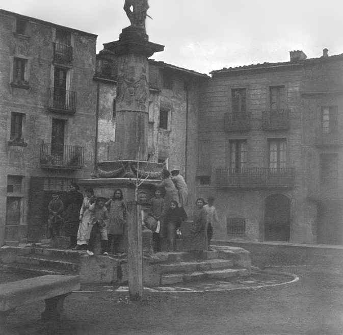 Font de Neptú a Igualada. Josep Salvany i Blanch (1913)